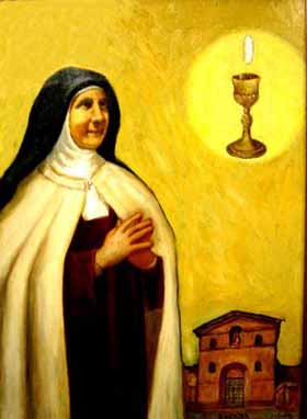 Мария Кандида Евхаристии (в миру Мария Барба), фрагмент. Автор неизвестен.